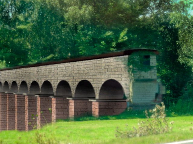 Gemauerte Rekonstruktion eines Pfeilers vor Ort, ergänzt um eine Computer-Simulation der Bogenstellungen dieser Druckwasserleitung in der Swistbachaue.